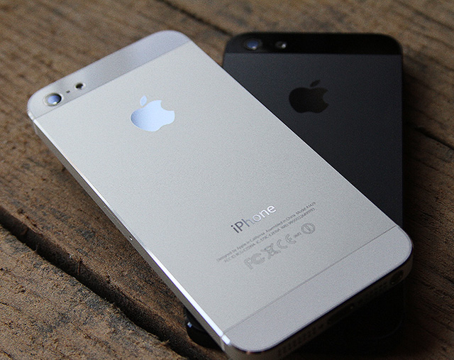 Iphone 5